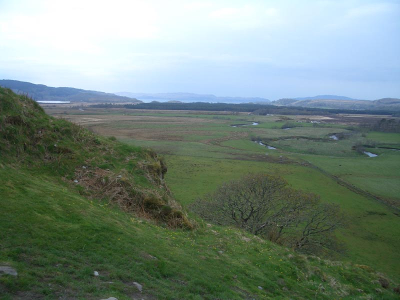 Blick von Dunadd in das Tal des Add in Richtung Loch Crinan, Argyll, Schottland